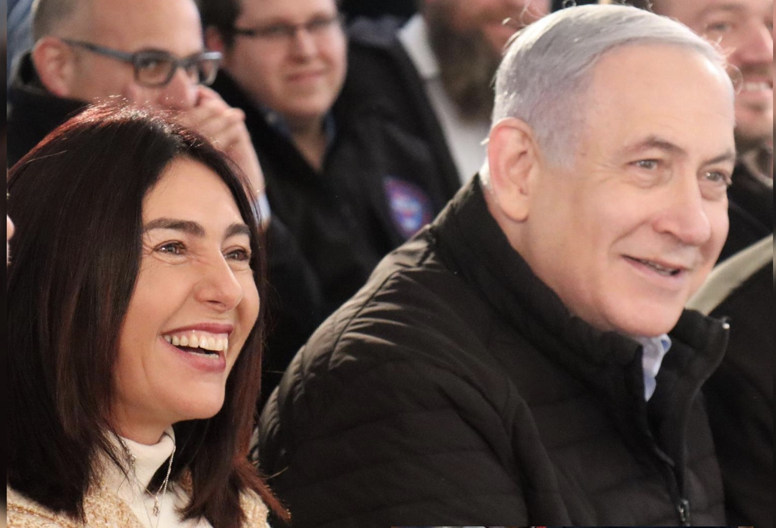 מירי רגב עם ראש הממשלה נתניהו, במסגרת תפקידה כיו״ר מטה הכנסים של הליכוד, בקמפיין הבחירות מרץ 2020